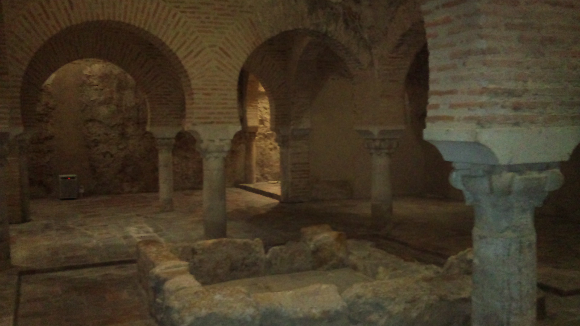 Sala templada de los Baños Árabes de Jaén.